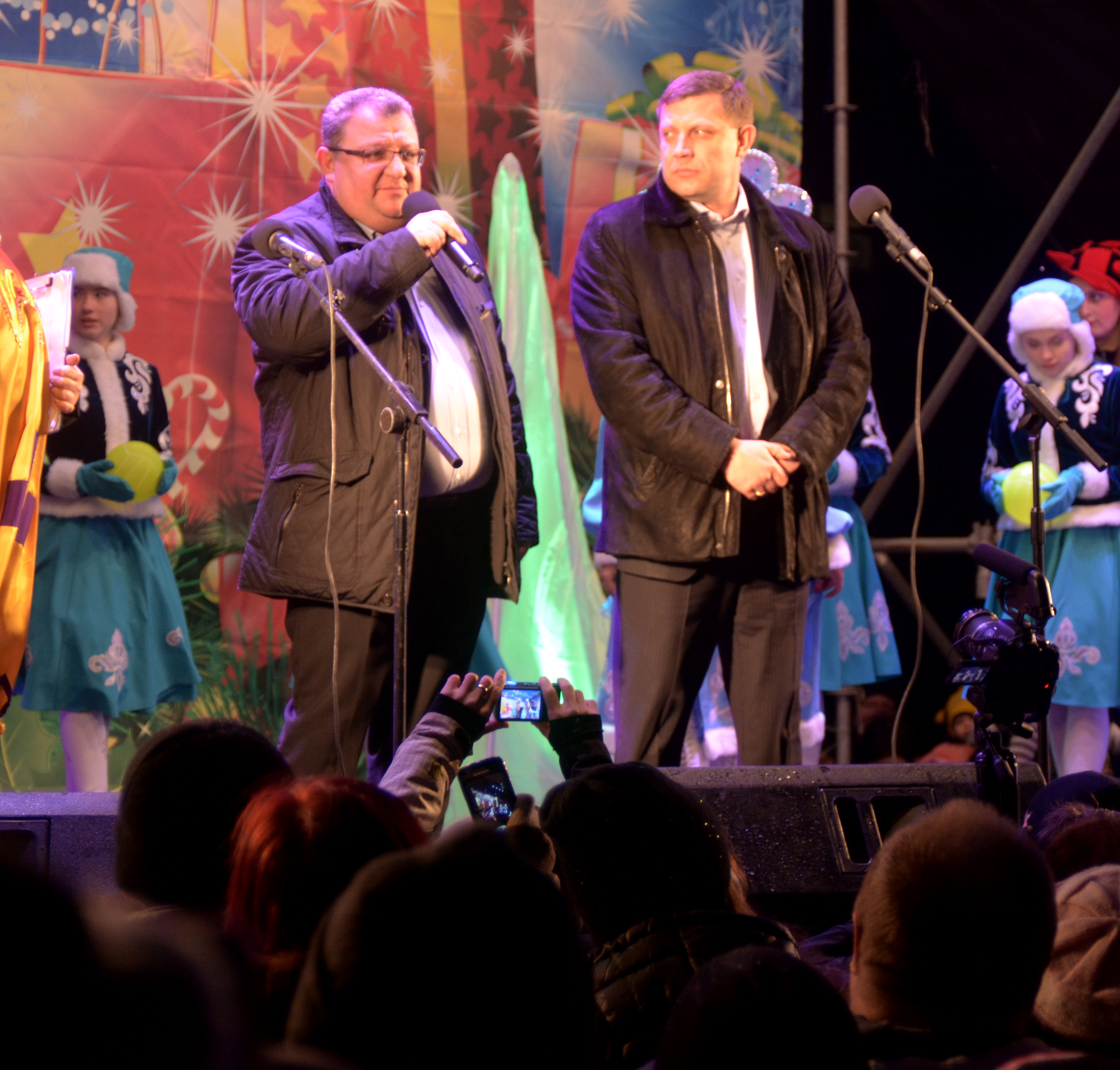 Открытие новогодней ёлки в Донецке